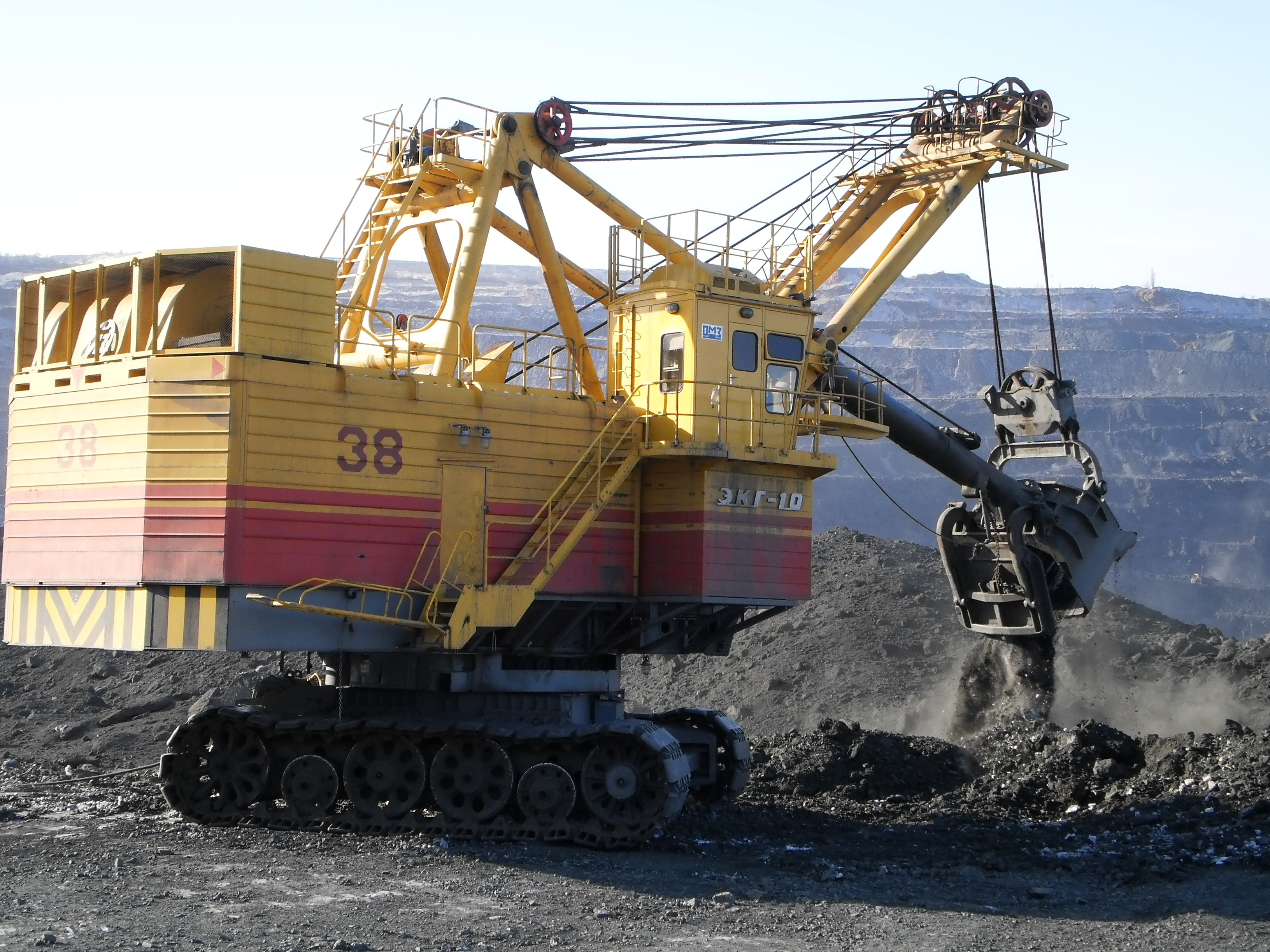 Электрический экскаватор с канатным приводом лебёдок.